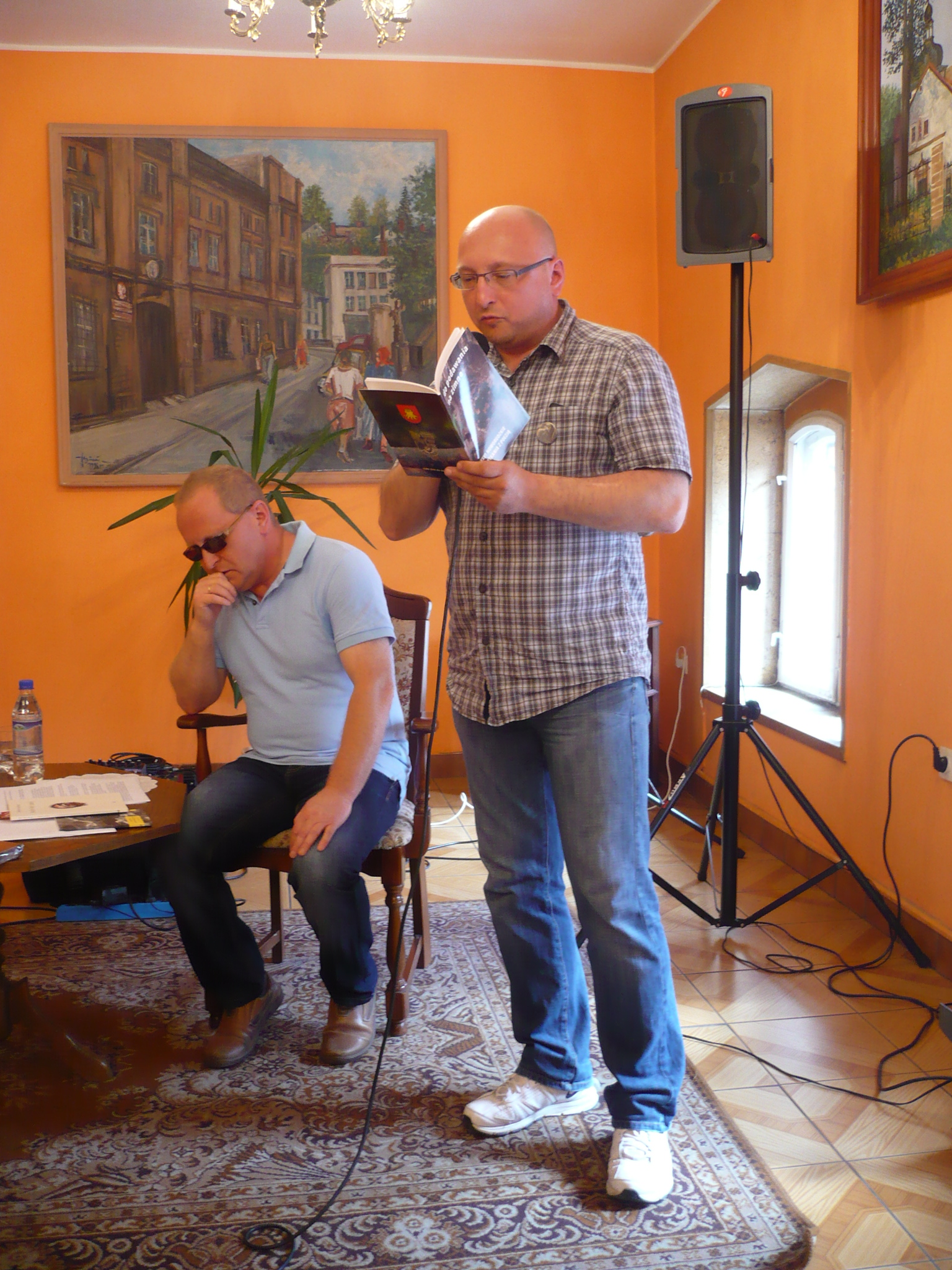 XXVI Noworudzkie Spotkania z Poezją